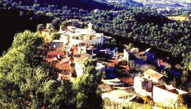 Arrour depuis Isumer. Photo rare ou on distingue l'ancienne mosquée